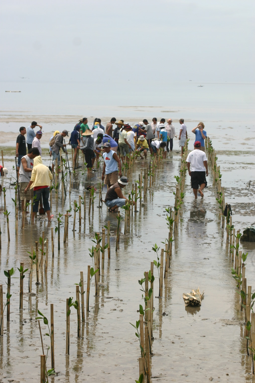 Mangrovenpflanzungen in Mindanao / Philippinen (Mama Earth)